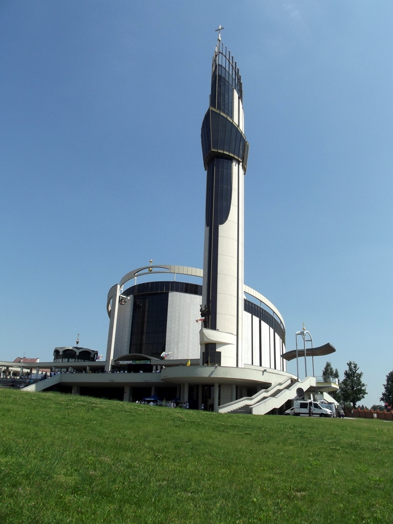 Zdjęcie zrobione podczas wydarzenia w "Rio w Krakowie", w Sanktuarium Bożego Miłosierdzia w Łagiewnikach.